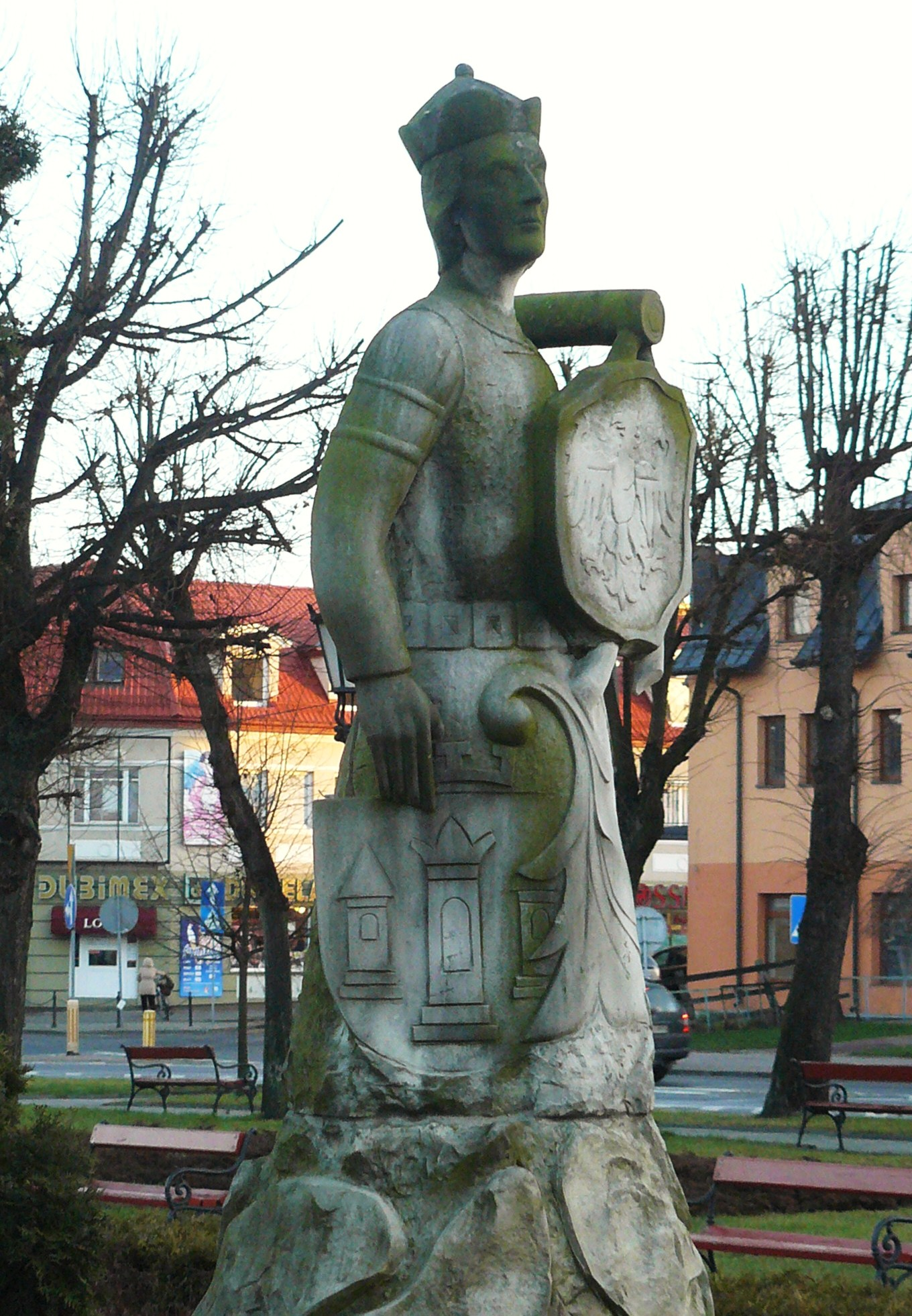 Pomnik na gostynińskim rynku.